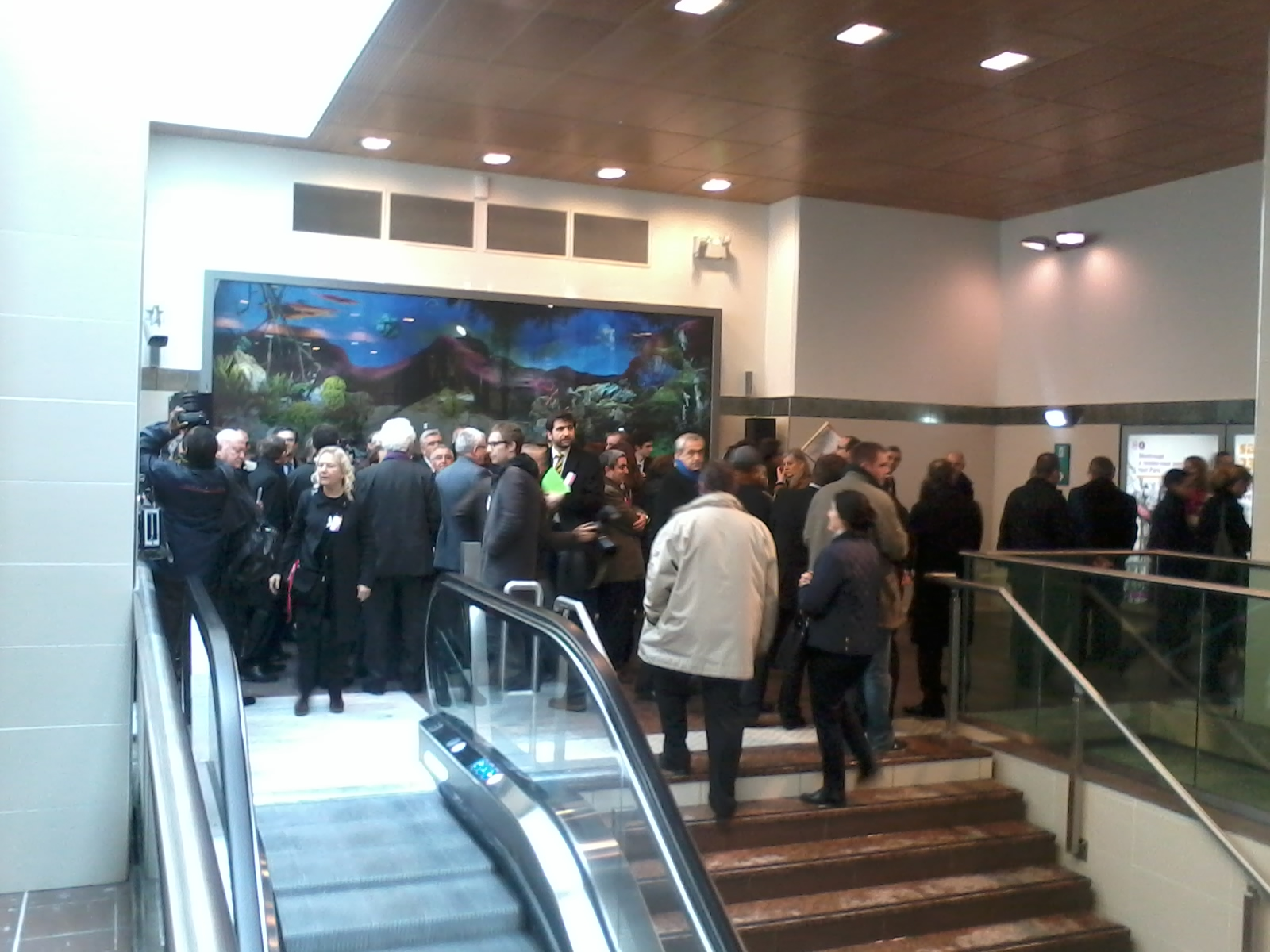 La salle des billets de la nouvelle station de métro Mairie de Montrouge